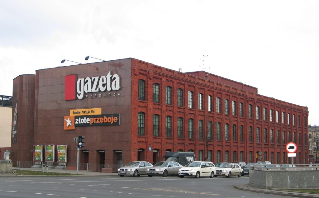 Fabryka Józefa Balle w Łodzi, obecnie siedziba łódzkiej redakcji Gazety Wyborczej